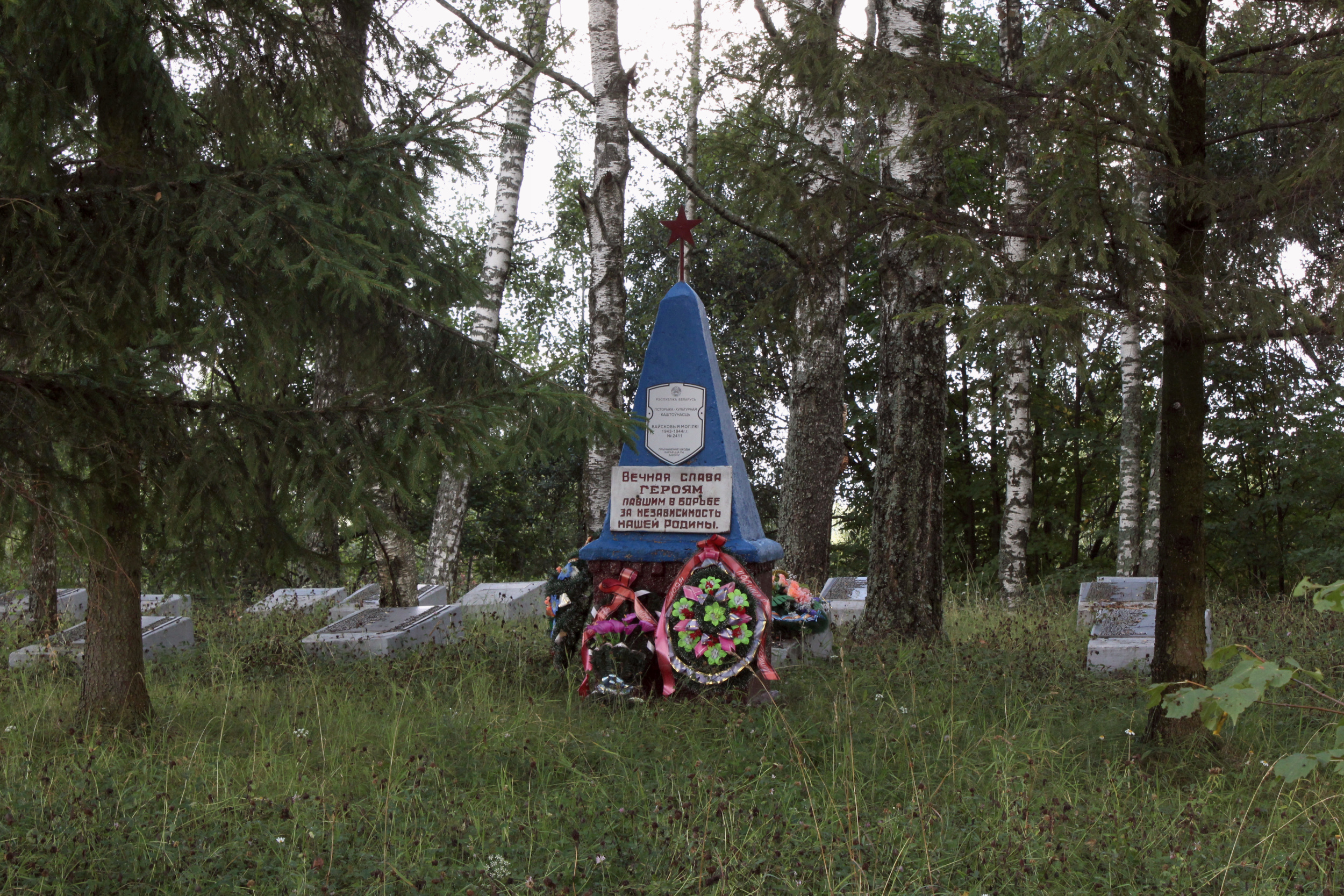 Вайсковыя могілкі. в. Кавалі _213Д000337 This is a photo of Belarusian heritage monument. Reference number: 213Д000337 ( WLM)